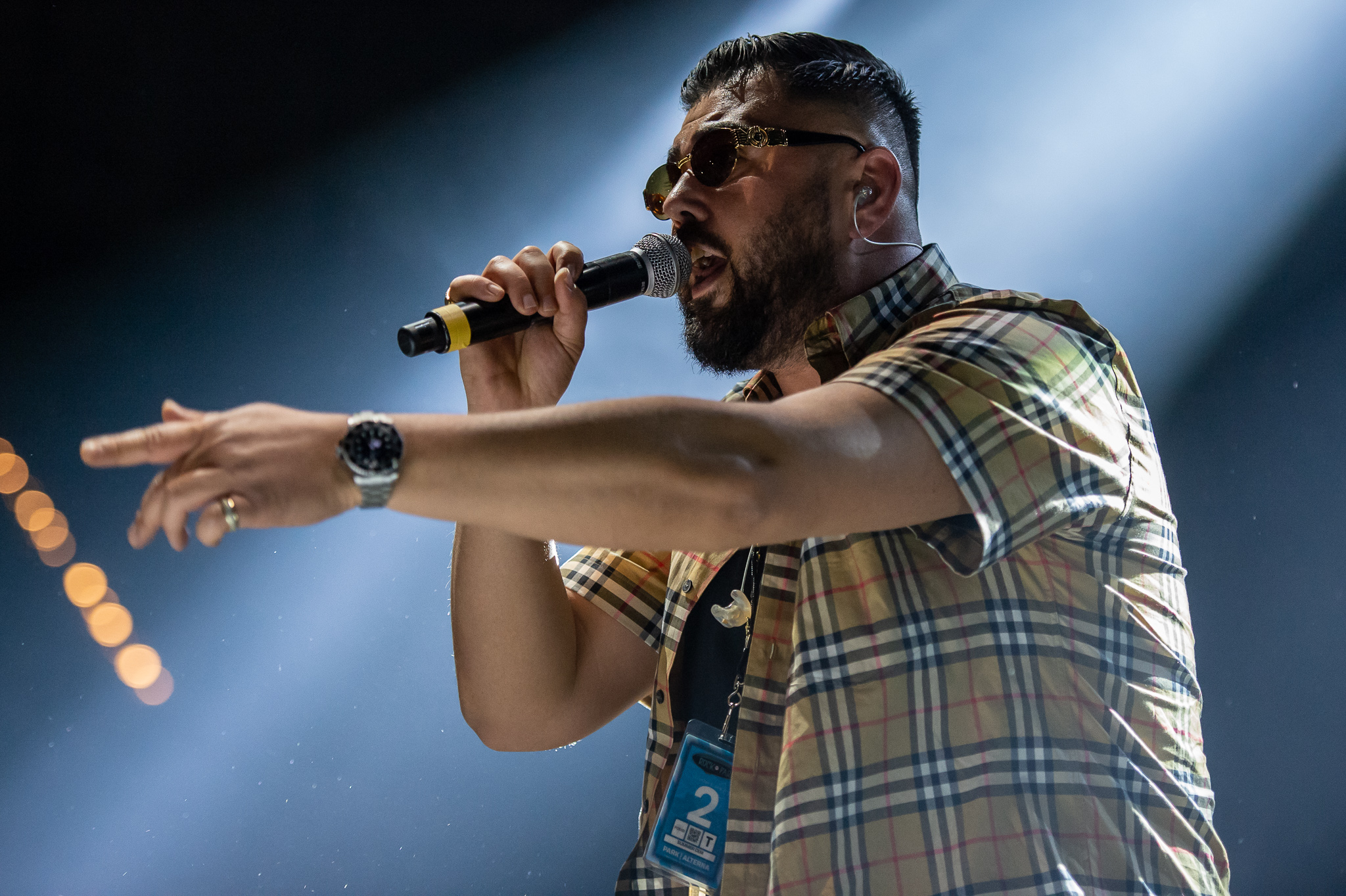 ARGO-Konzerte,Alternarena,Cem Toraman,Festival,Konzert,Livekonzert,Livemusik,Musik,RiP,Rock im Park 2018,Summer Cem